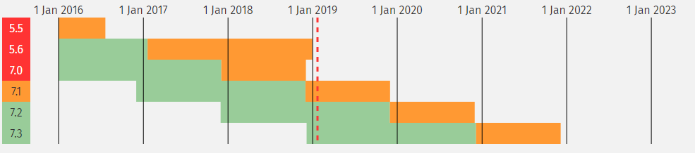 PHP supporte versions